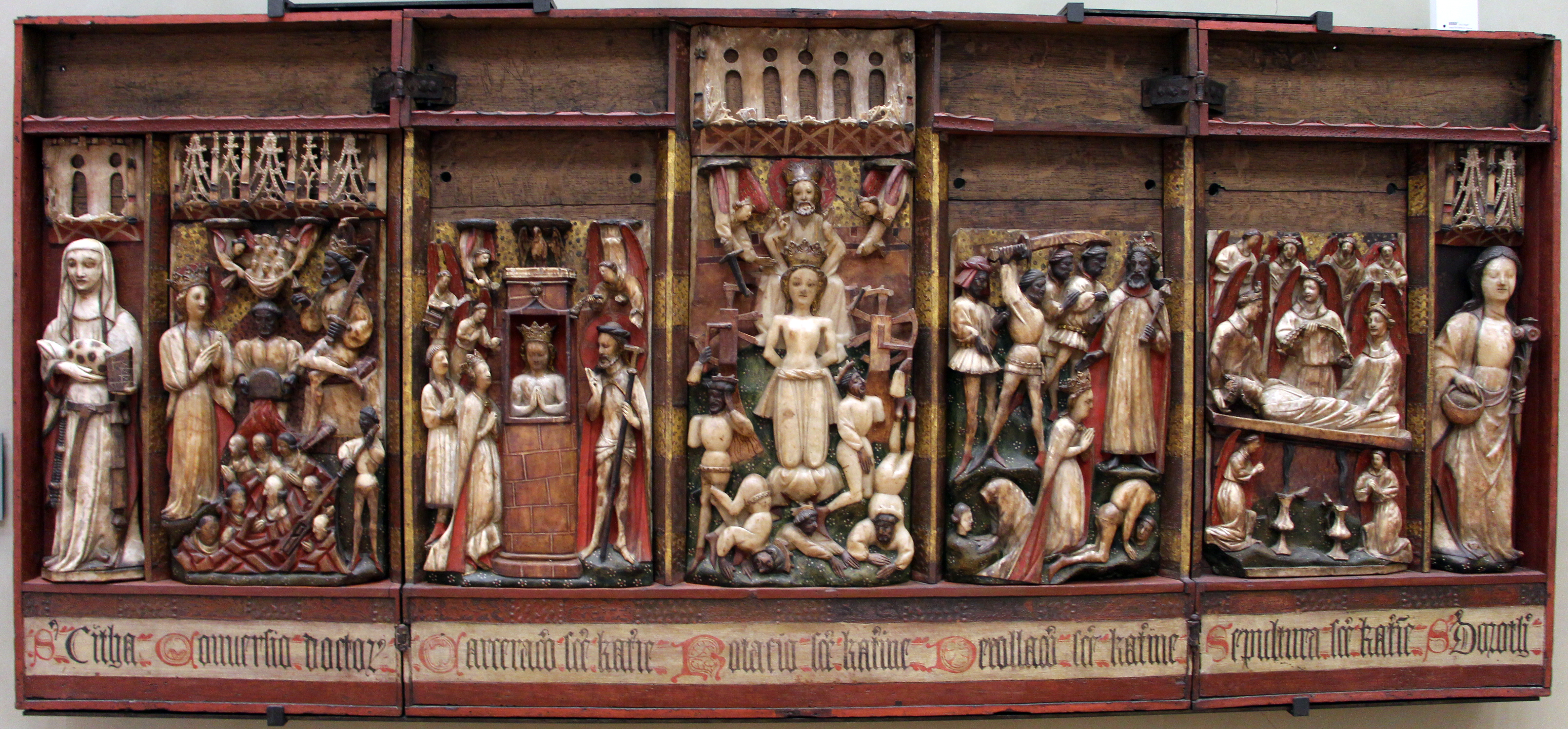 Galleria G. Franchetti alla Ca' d'Oro - MIBAC The making of this document was supported by Wikimedia CH. (Submit your project!) For all the files concerned, please see the category Supported by Wikimedia CH. This is a photo of a monument which is part of cultural heritage of Italy.